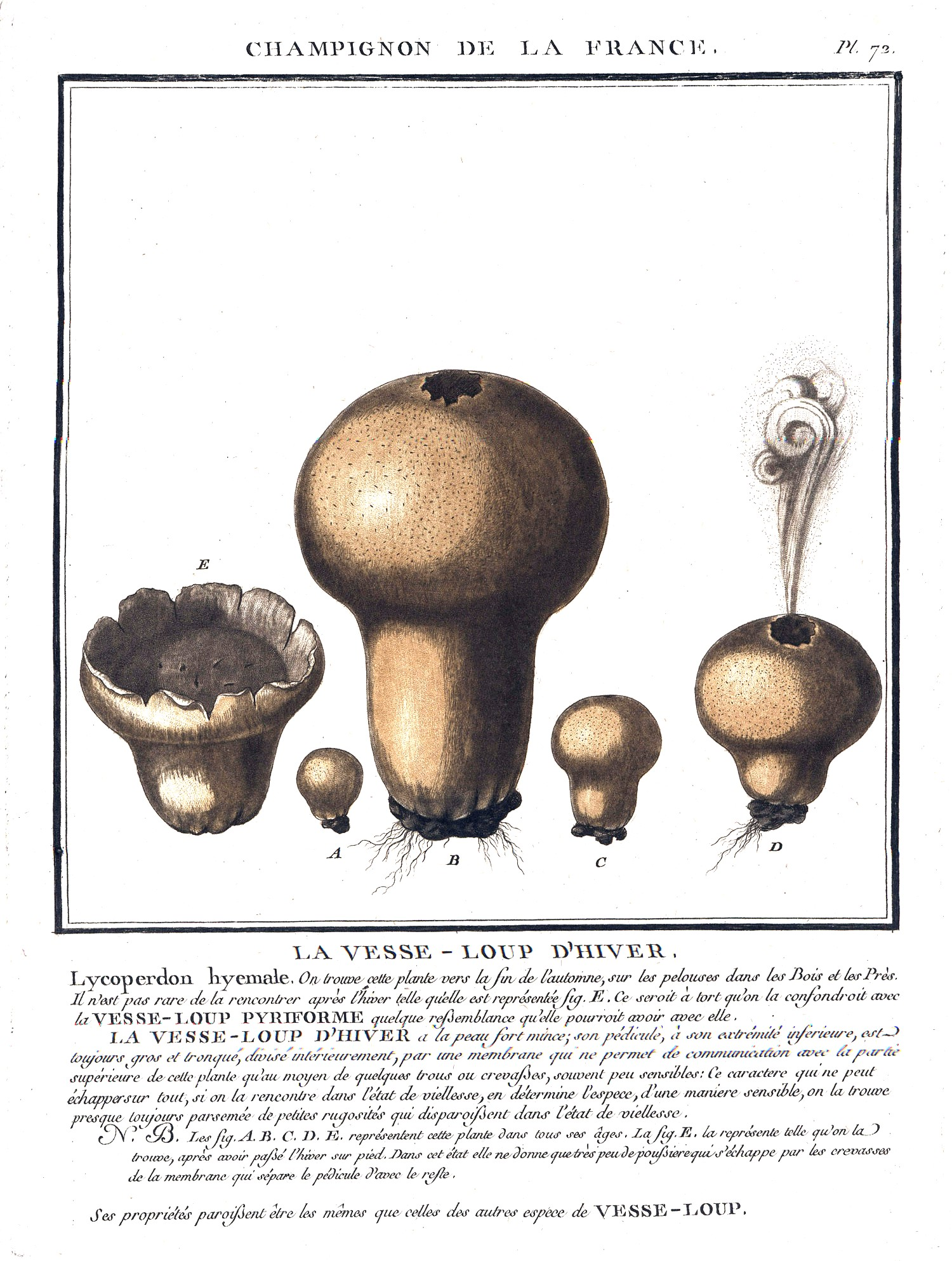 Lycoperdon hyemale - Plate 72 from "Champignons de la France"